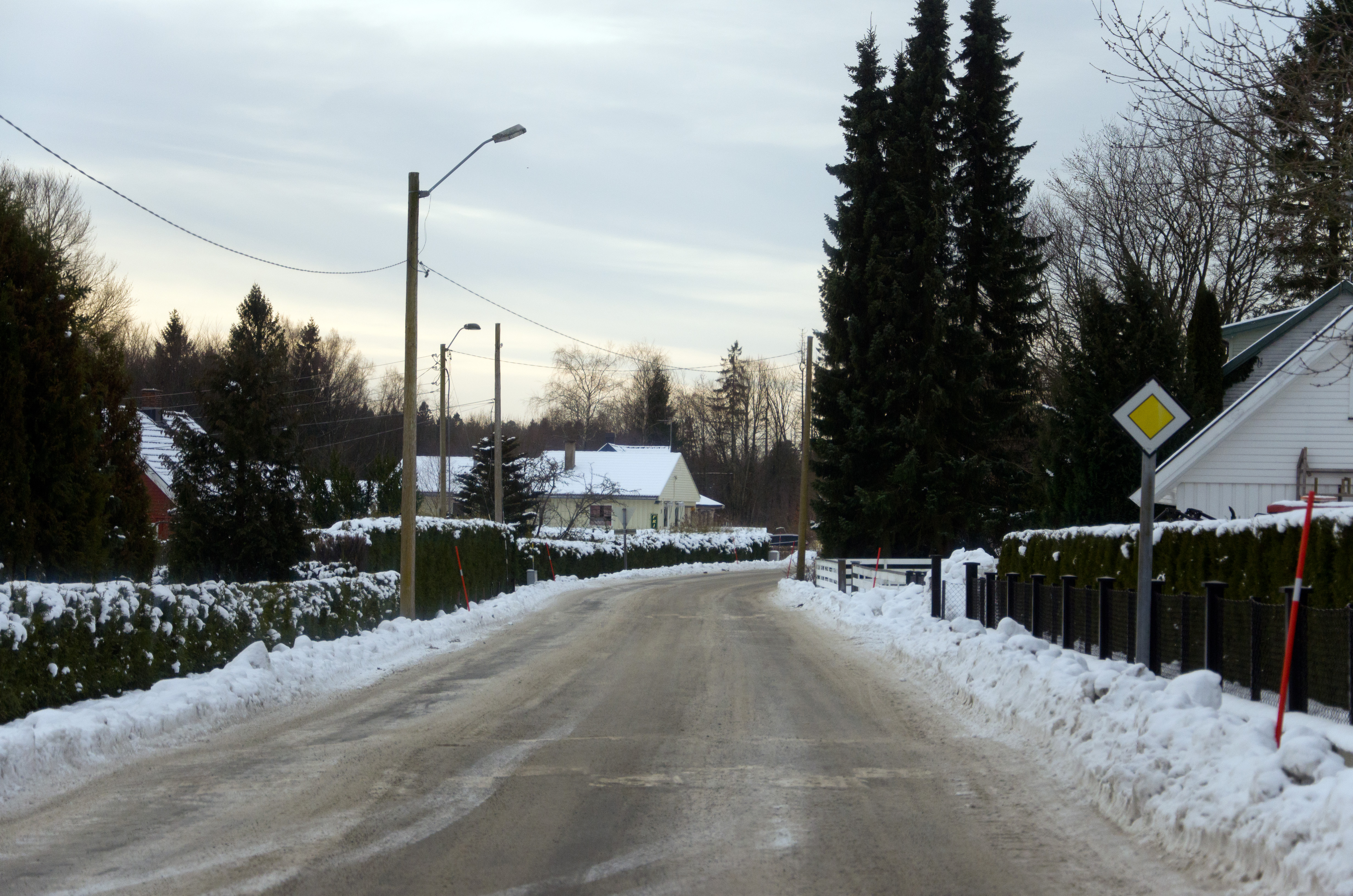 Vestfolds fylkesvei 202 Verningenveien i Larvik